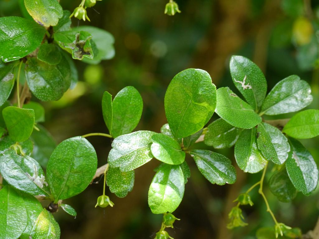 Carmona retusa：フクマンギ 2015/08/25 沖縄本島：Okinawa Island, Japan